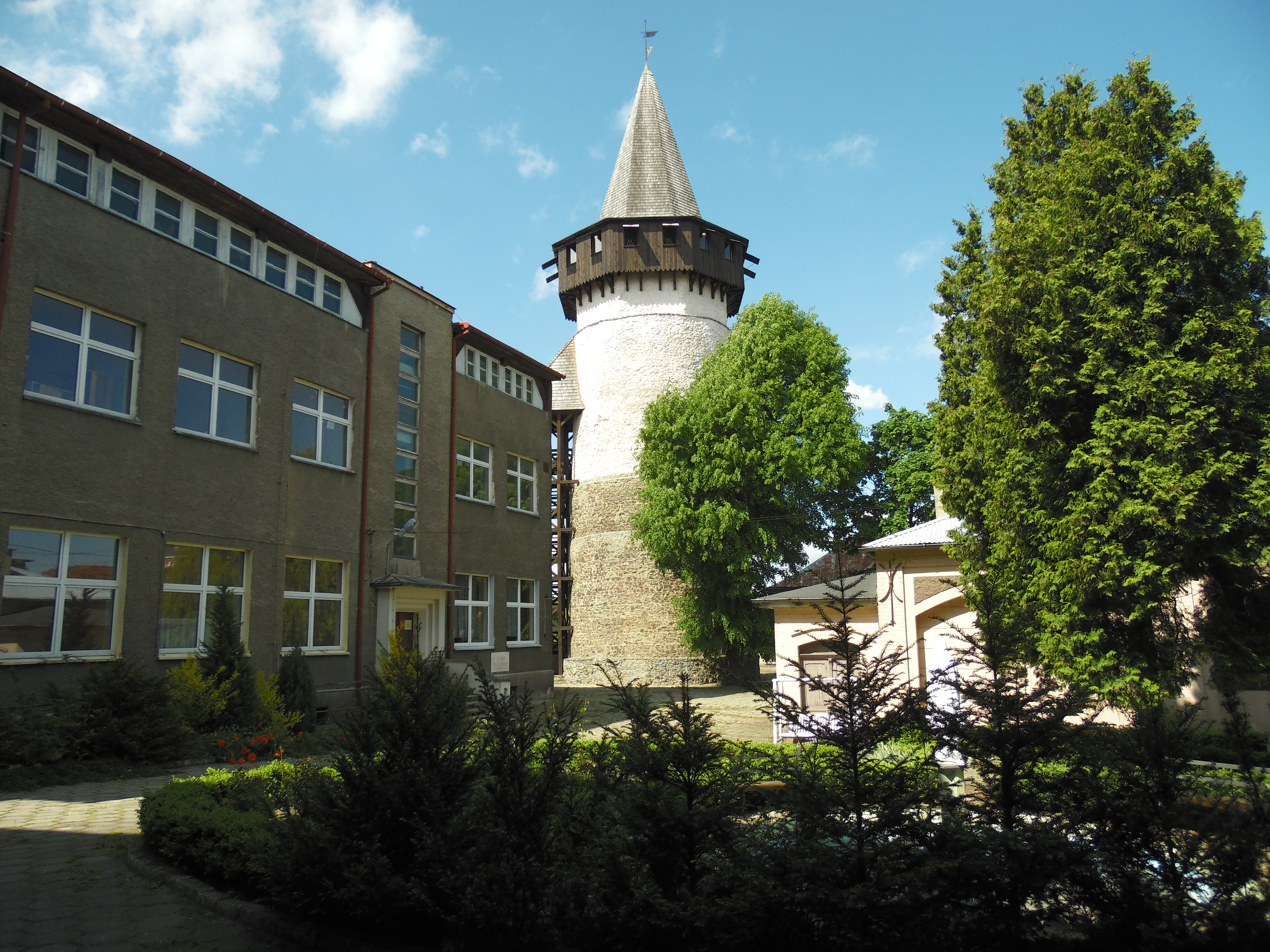 Prudnik, Poland